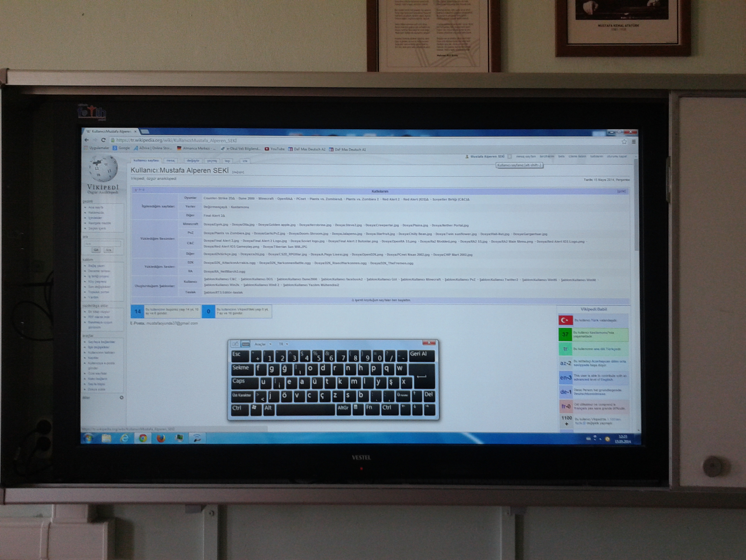 Fatih Projesi kapsamında okullara dağıtılan Akıllı Tahtalardan biri.